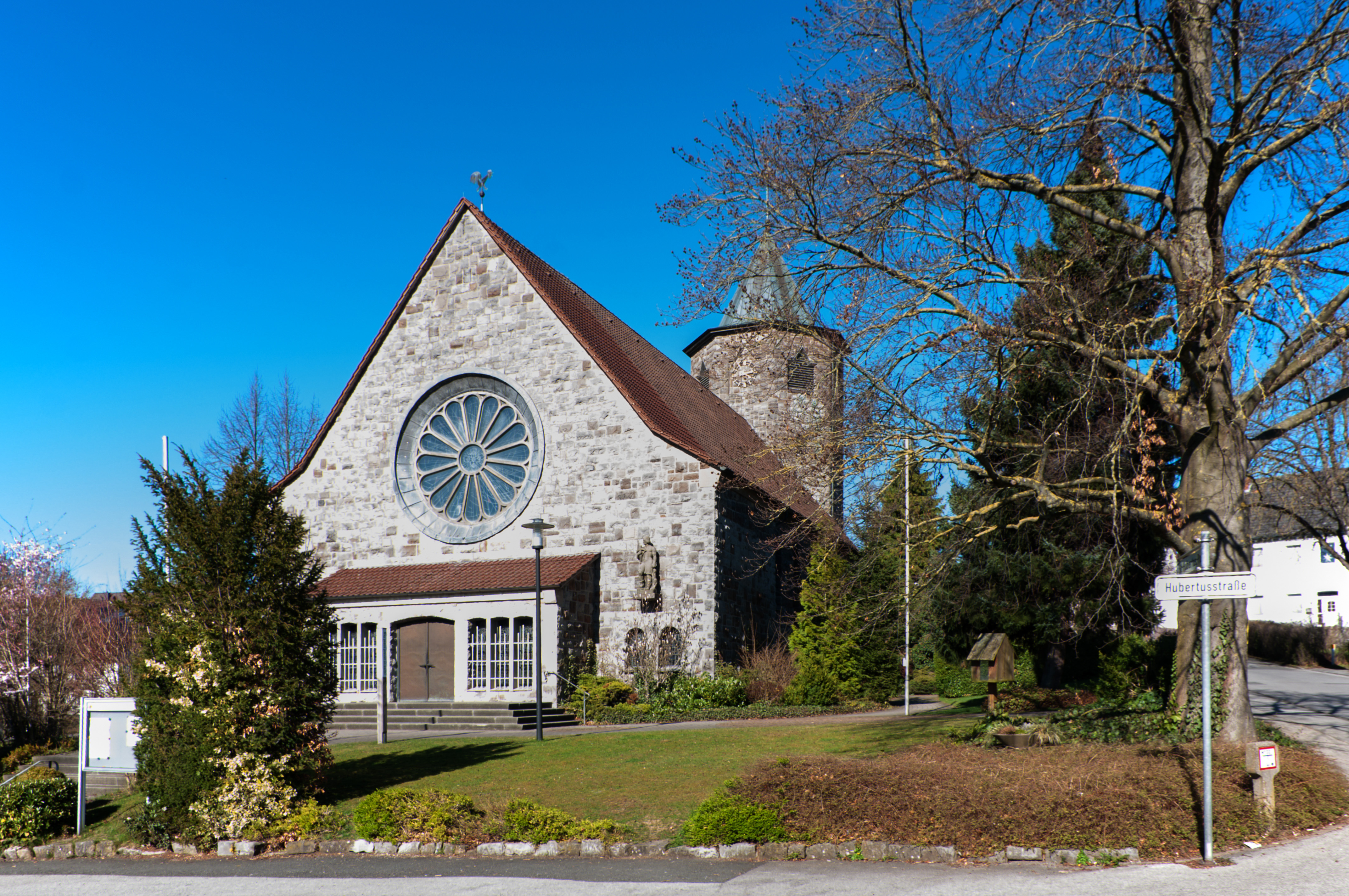 AR-Müschede - Kirche St. Hubertus; Süd-West-Ansicht